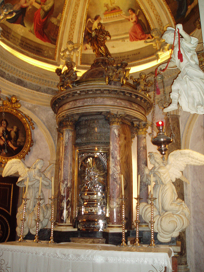 Oratorio de la Santa Cueva en Cádiz, España. Templete neoclásico de Torcuato Benjumeda.